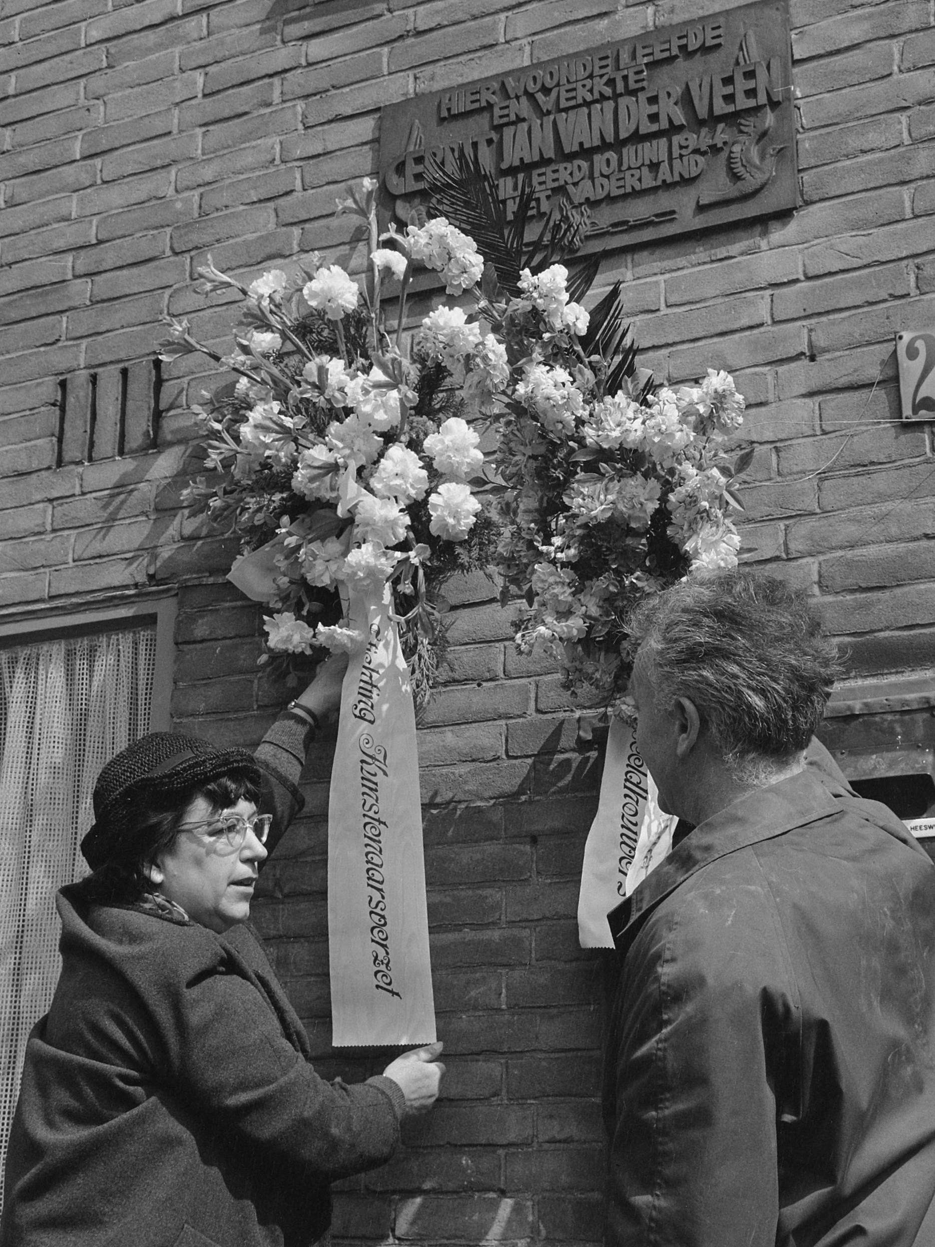 Herdenking Gerrit Jan van der Veen, mevrouw Louise van der Veen-van der Chijs en de heer Cor Hund hangen krans op het huis waar de verzetsheld woonde 10 juni 1965